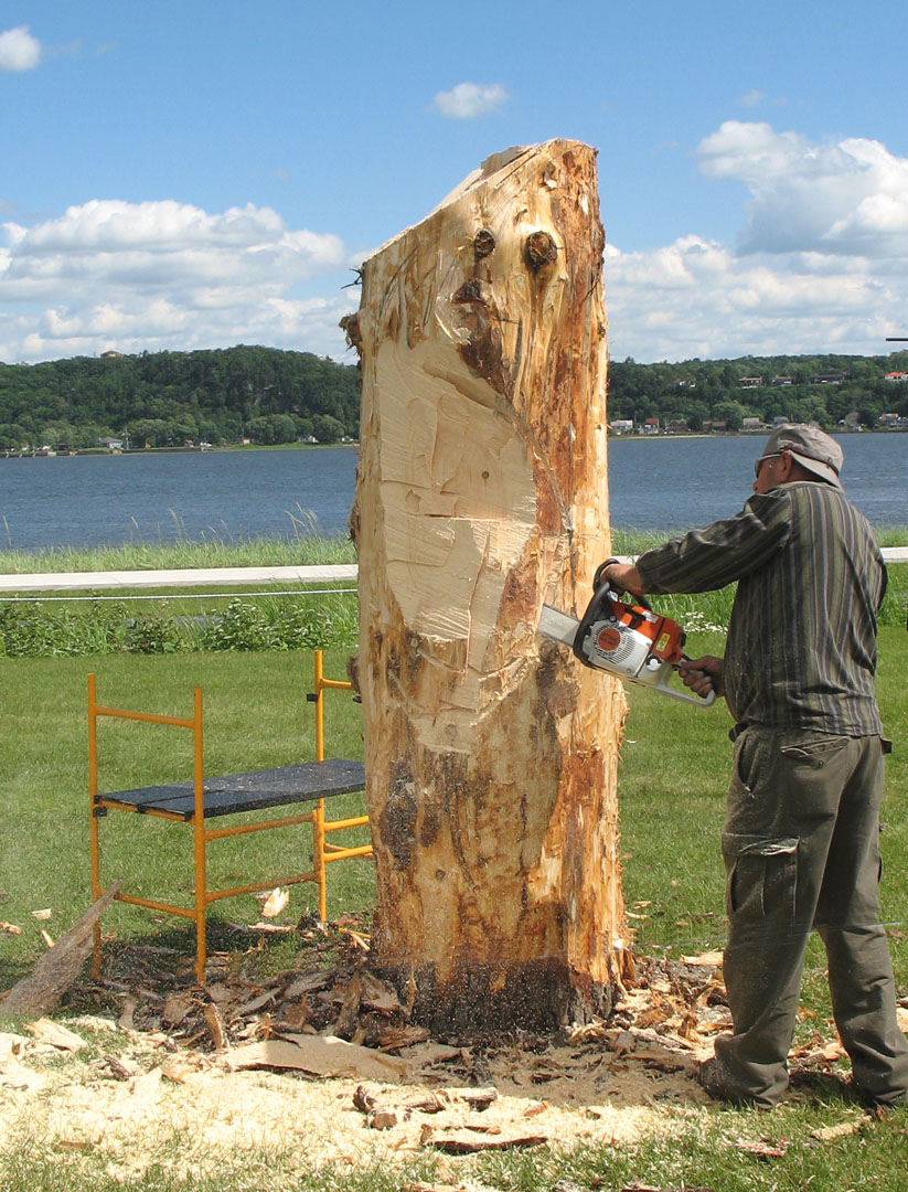 La Rencontre des peuples, symposium de sculpture sur la promenade Samuel-De Champlain, du 11 au 20 juillet 2008, dans le cadre des Fêtes du 400e anniversaire de la ville de Québec et de l'Internationale de la sculpture de Saint-Jean-Port-Joli. Sur la photo, le sculpteur québécois Clermont Gagnon, gagnant du prix du public, débutant son œuvre.